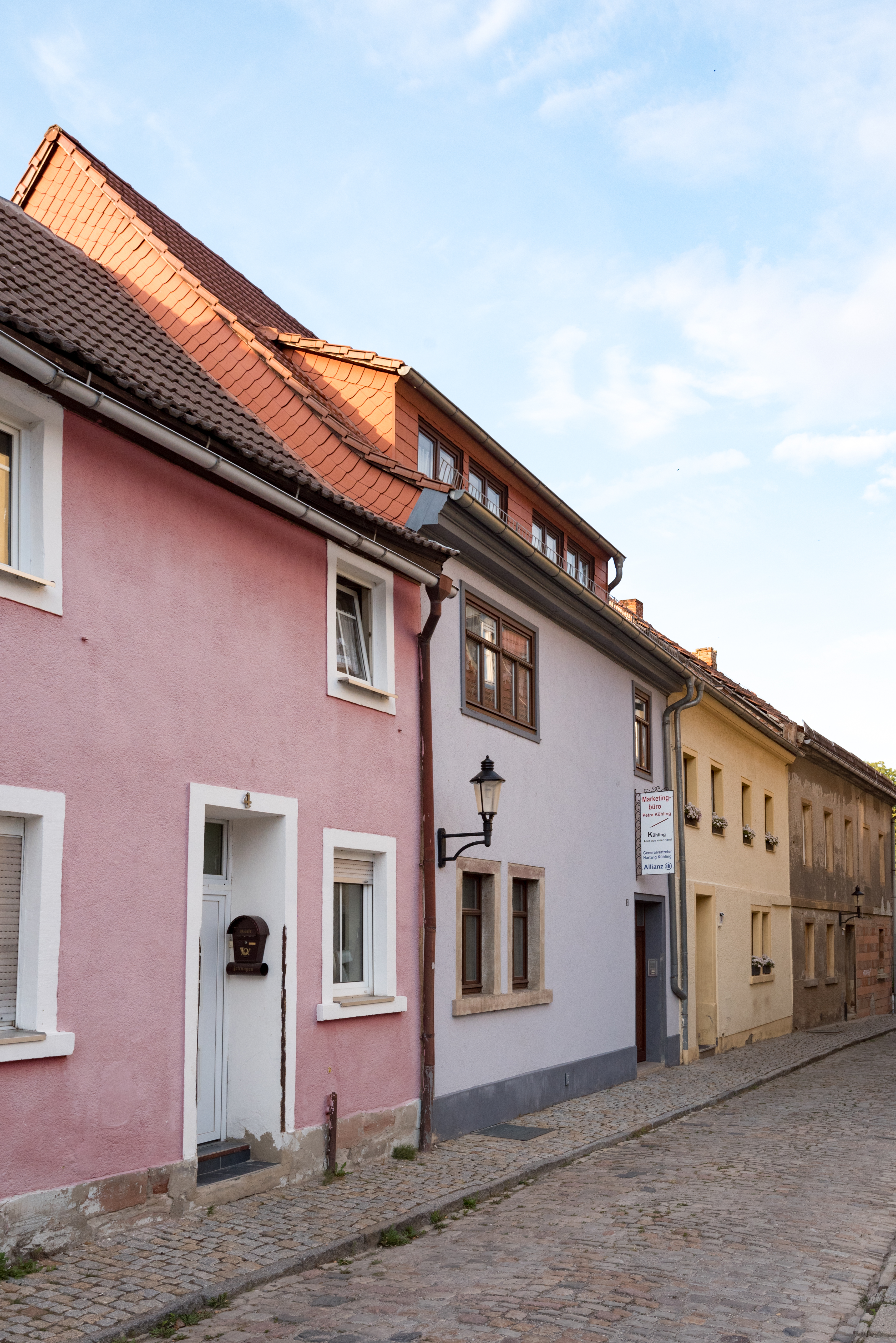 Naumburg (Saale), Webergasse 3